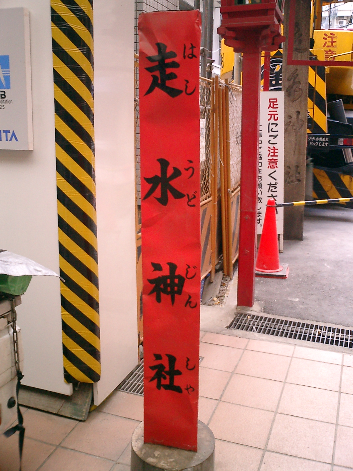 Hashiudo_Jinja